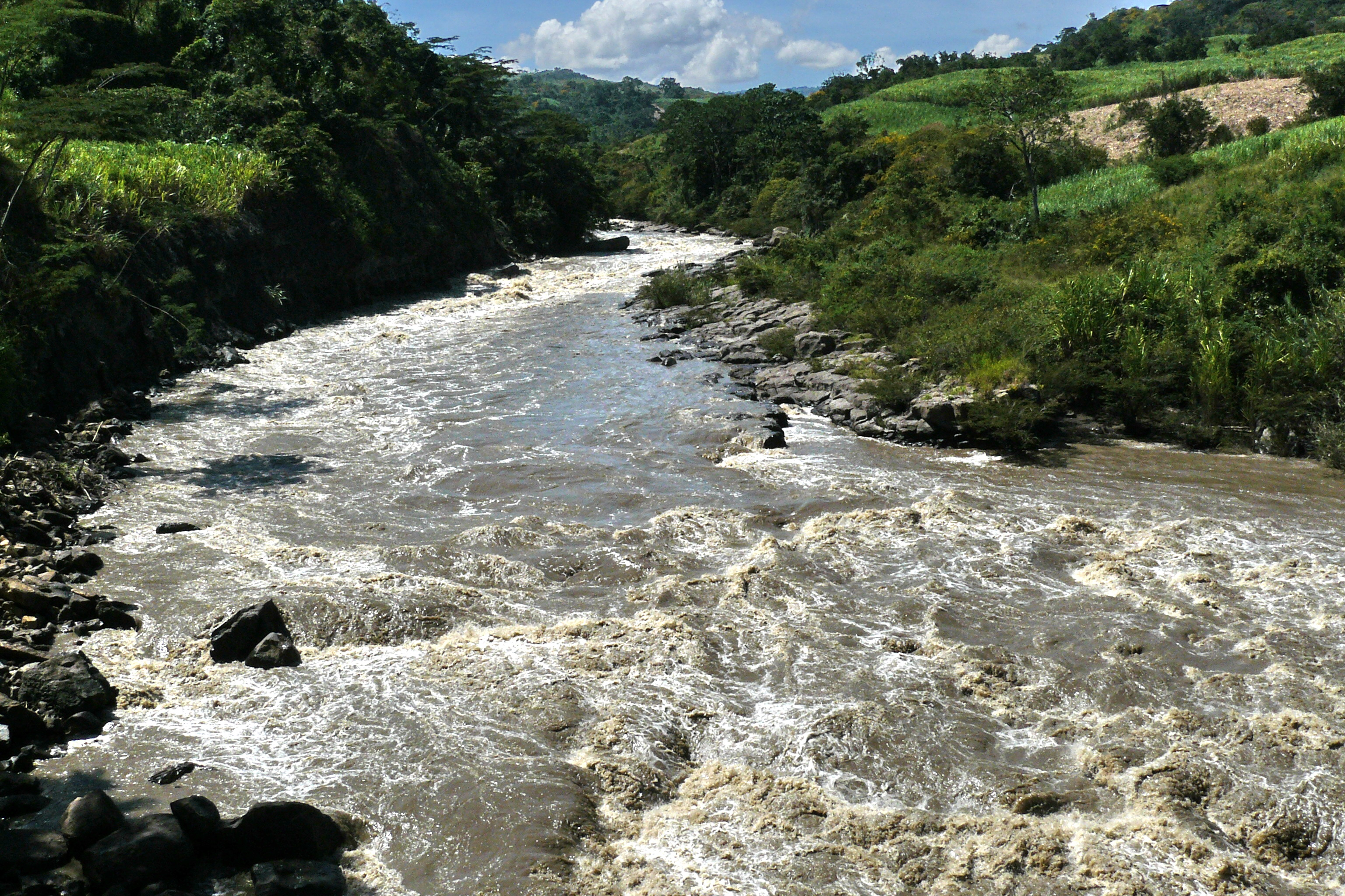 Río Suares entre Santander y Boyacá, cerca de Barbosa (Sder y Santana (Boy)